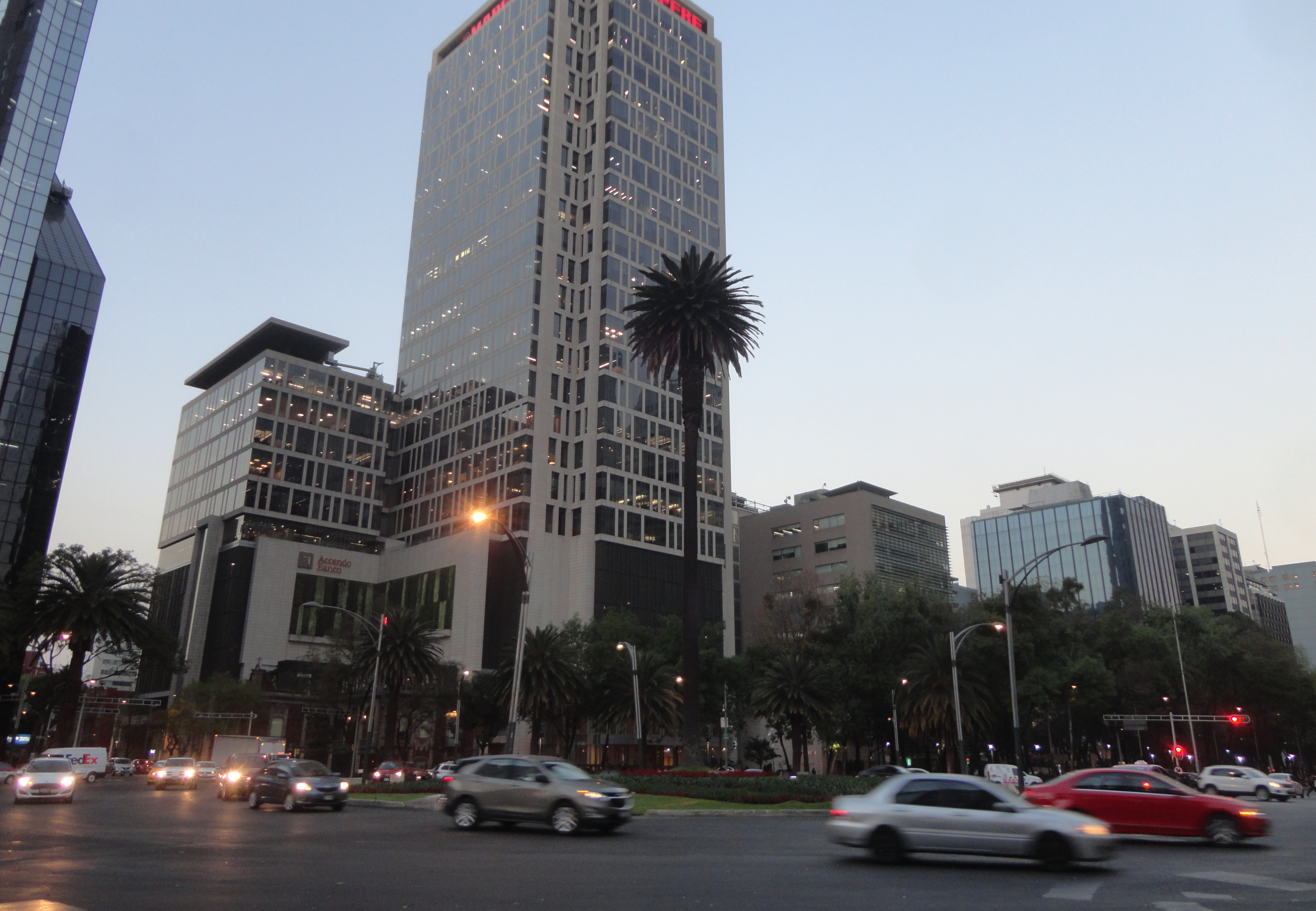 Glorieta de la Palma en Paseo de la Reforma, Ciudad de México, México.